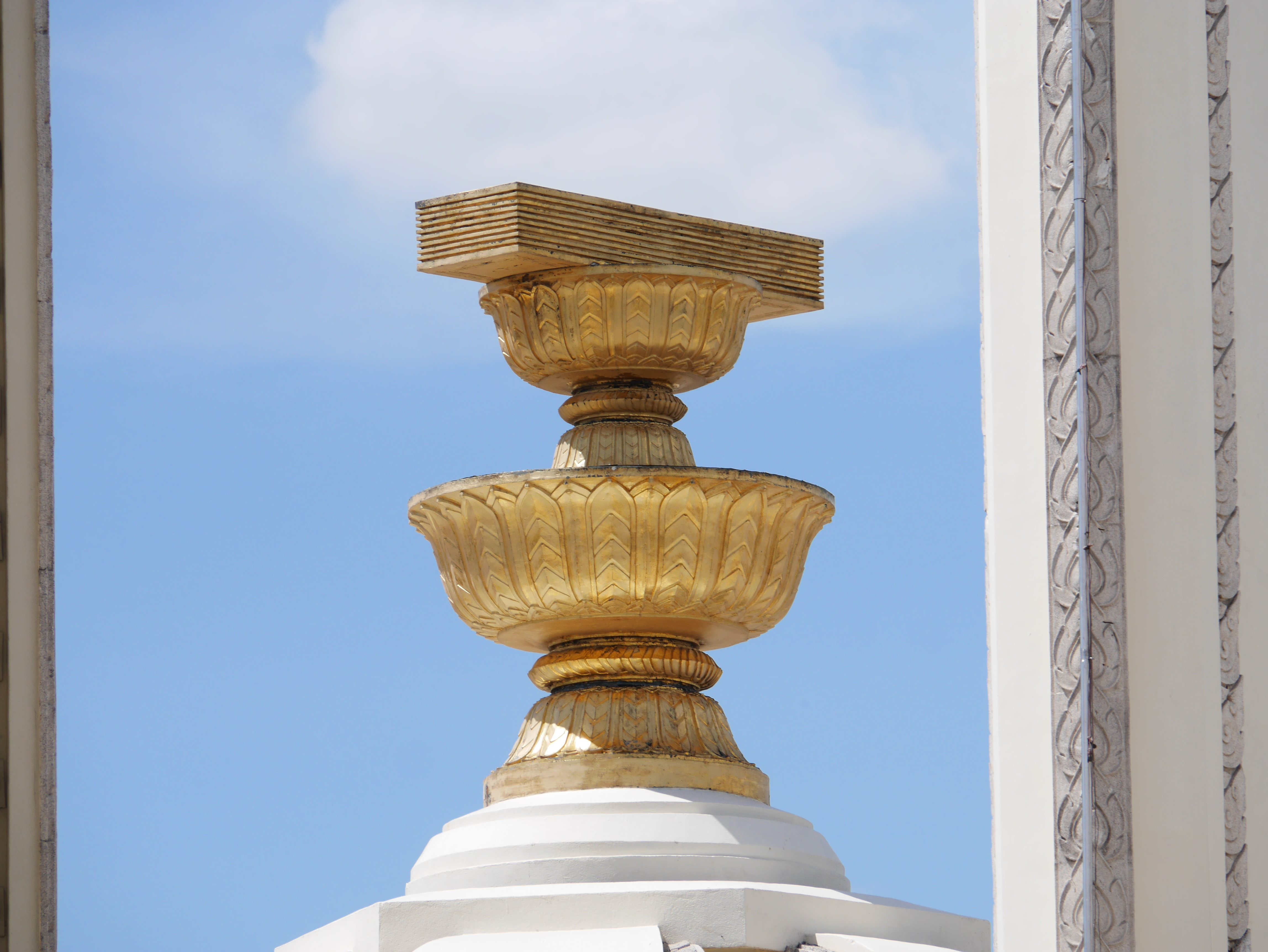 อนุสาวรีย์ประชาธิปไตย